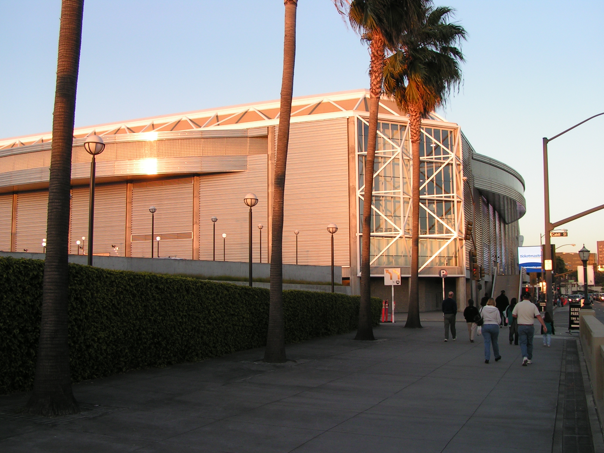 HP Pavillon San Jose Callifornia